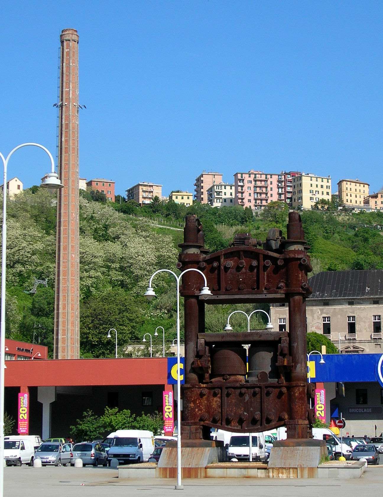 Genoa, Campi